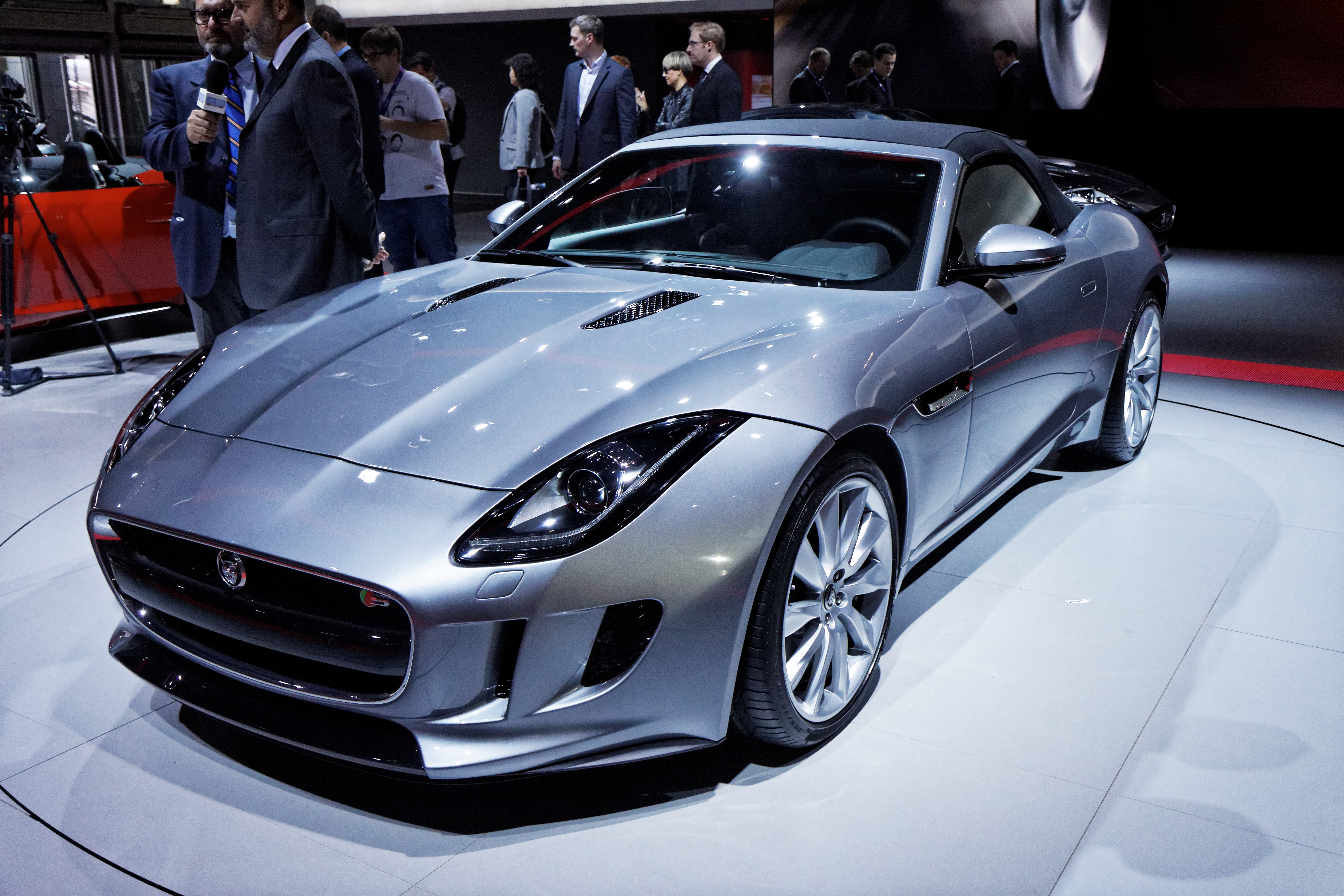 Une Jaguar F type présentée lors du Mondial de l'automobile de Paris 2012.